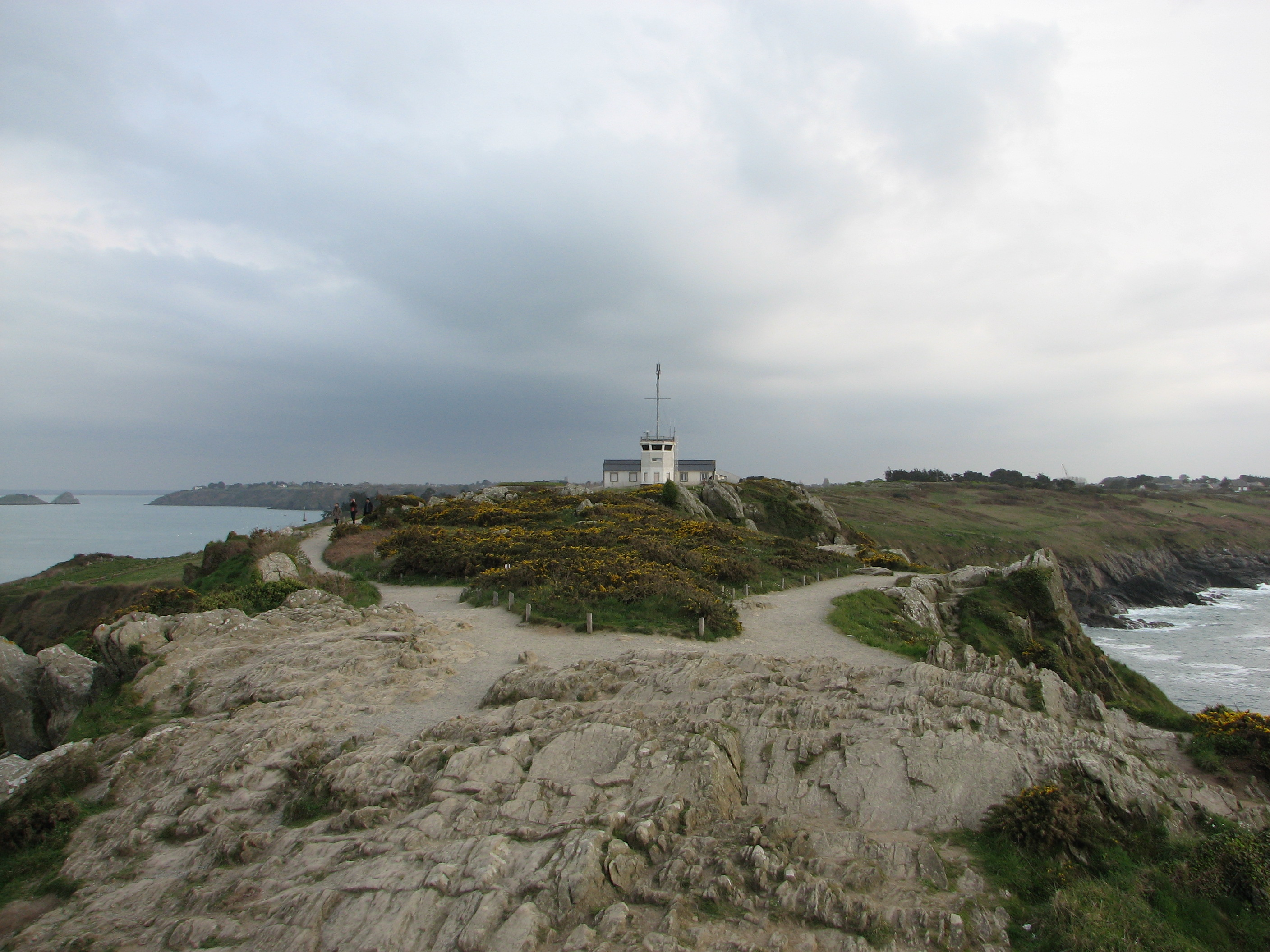 Pointe du Groin - Sémaphore